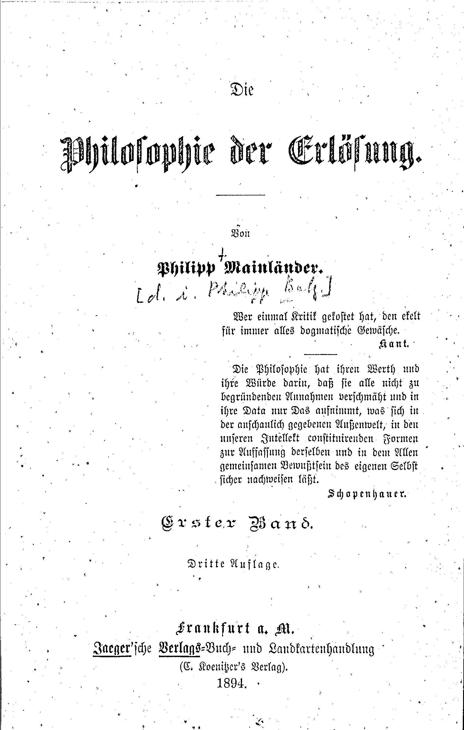 Seite I (Vorwort) von Philosophie der Erlösung, Band 1